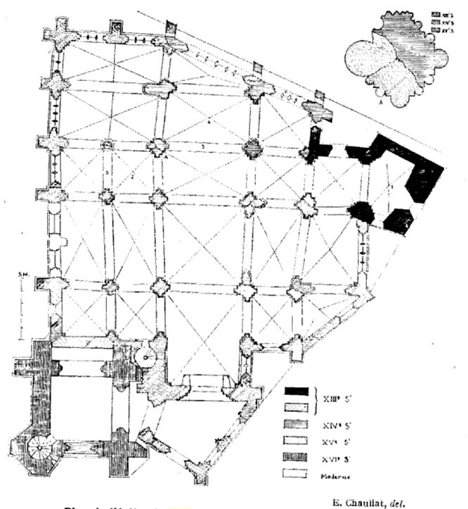 Plan de l'église Saint-Médard de Creil, indispensable pour comprendre le plan déroutant de l'édifice.